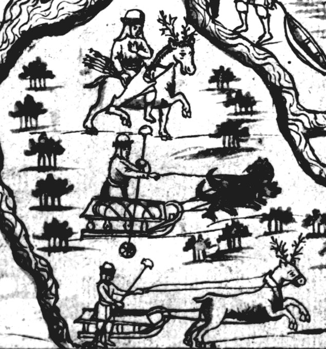 Сибирские народы ("остяки и самоядь ездят на оленях и псах")